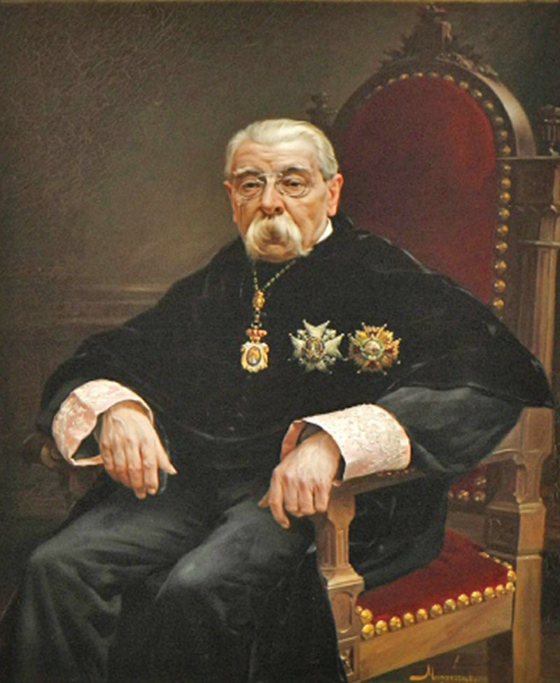 Retrat de Manel Duran i Bas (1900-1901)